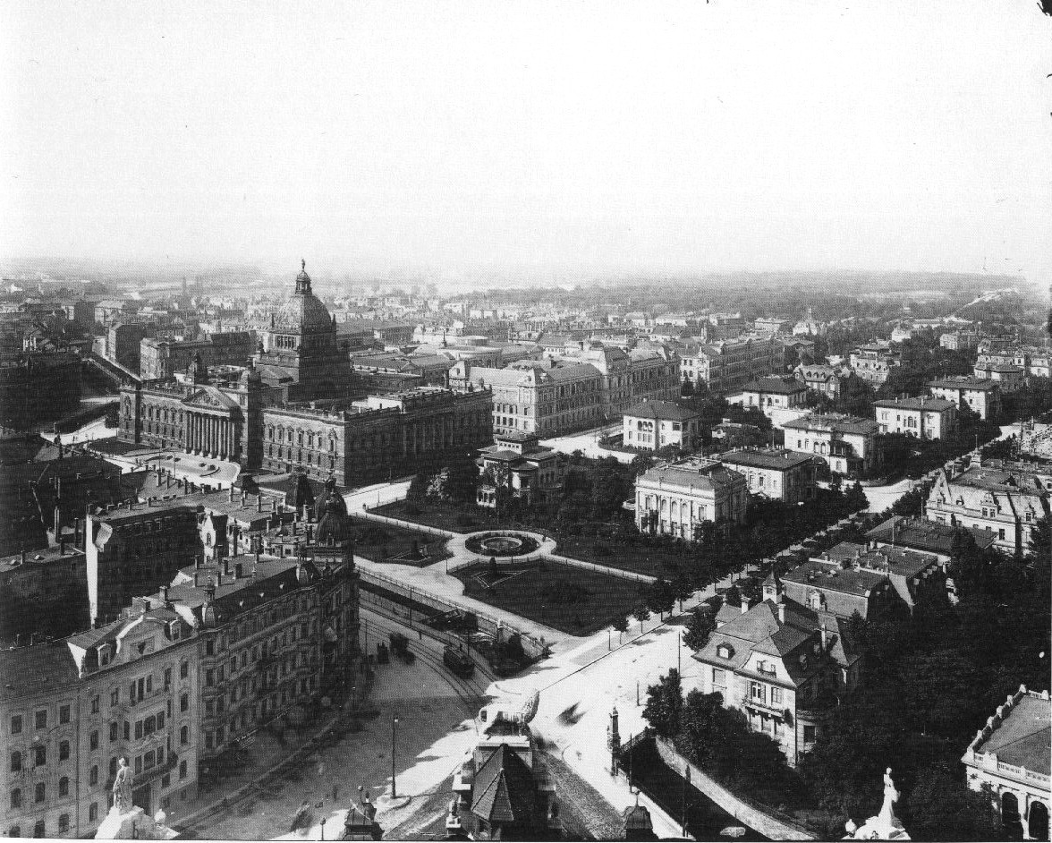 Blick vom Turm des Neuen Rathaus auf das Villenviertel zwischen Karl-Tauchnitz-Straße und Wächterstraße, um 1900.